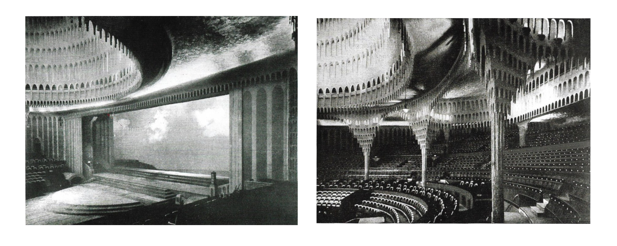 La salle du Großes Schaupielhaus (ancien cirque Schumman), 1920